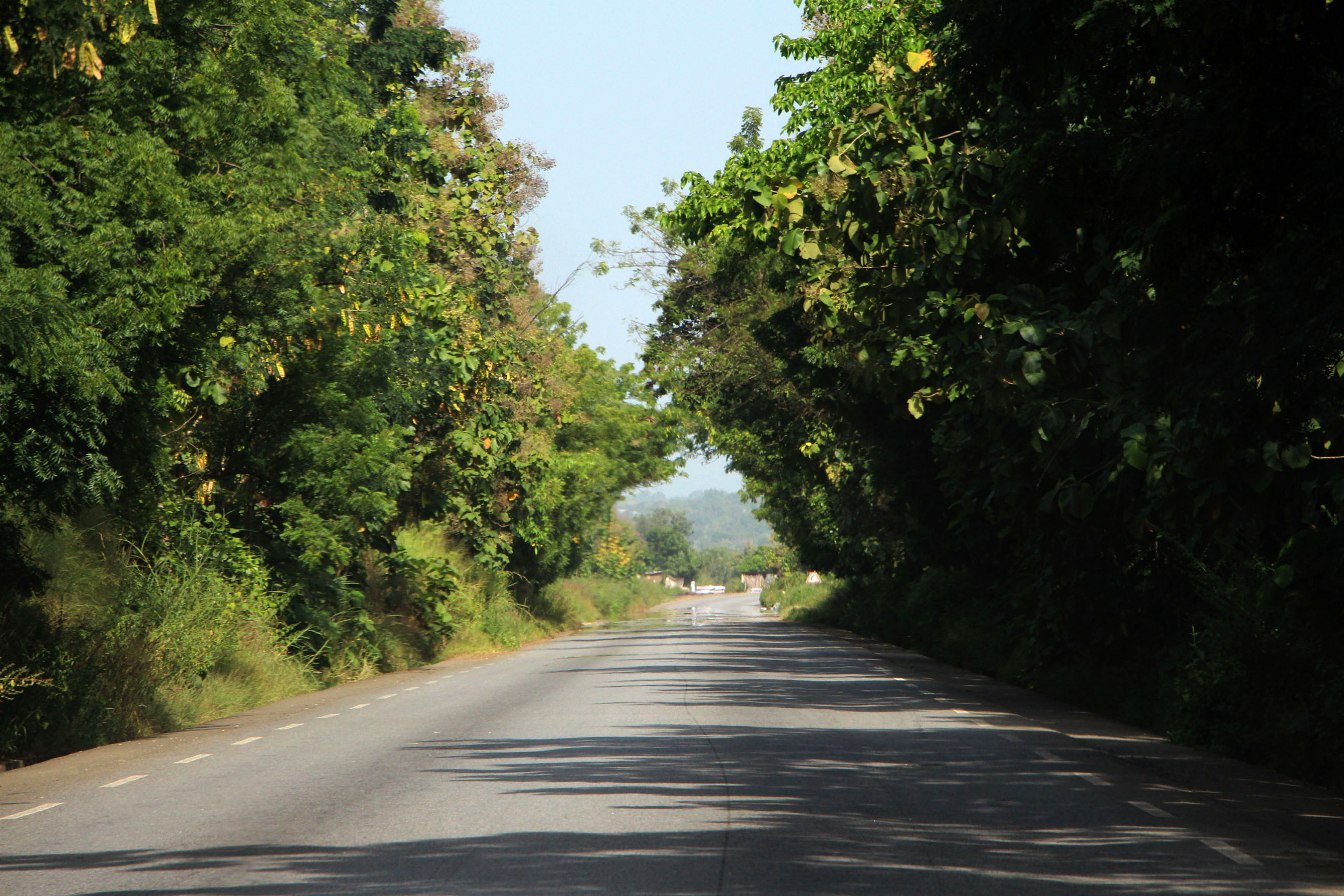 a panoramic view with the shade all around the new road leading to tchaorou This is an image with the theme "Africa on the Move or Transport" from: Benin